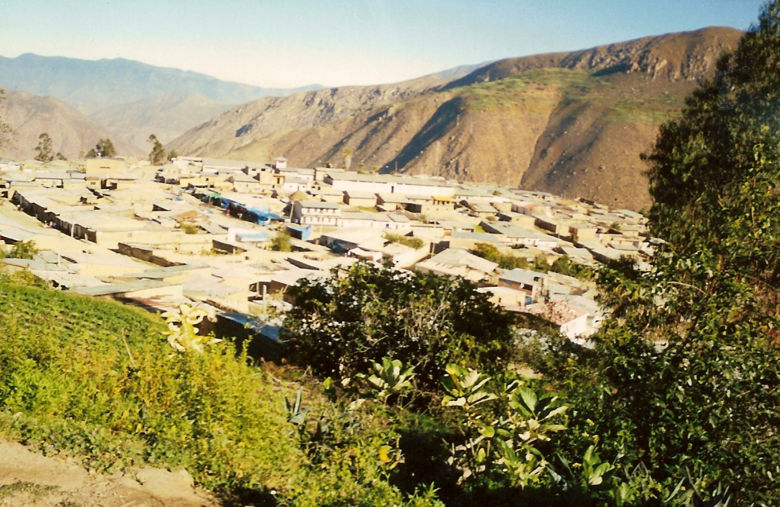 distrito de cajacay, prov, Bolognesi, Departamento Ancash, se encuentra a 2599 msnm, valle del rio fortaleza